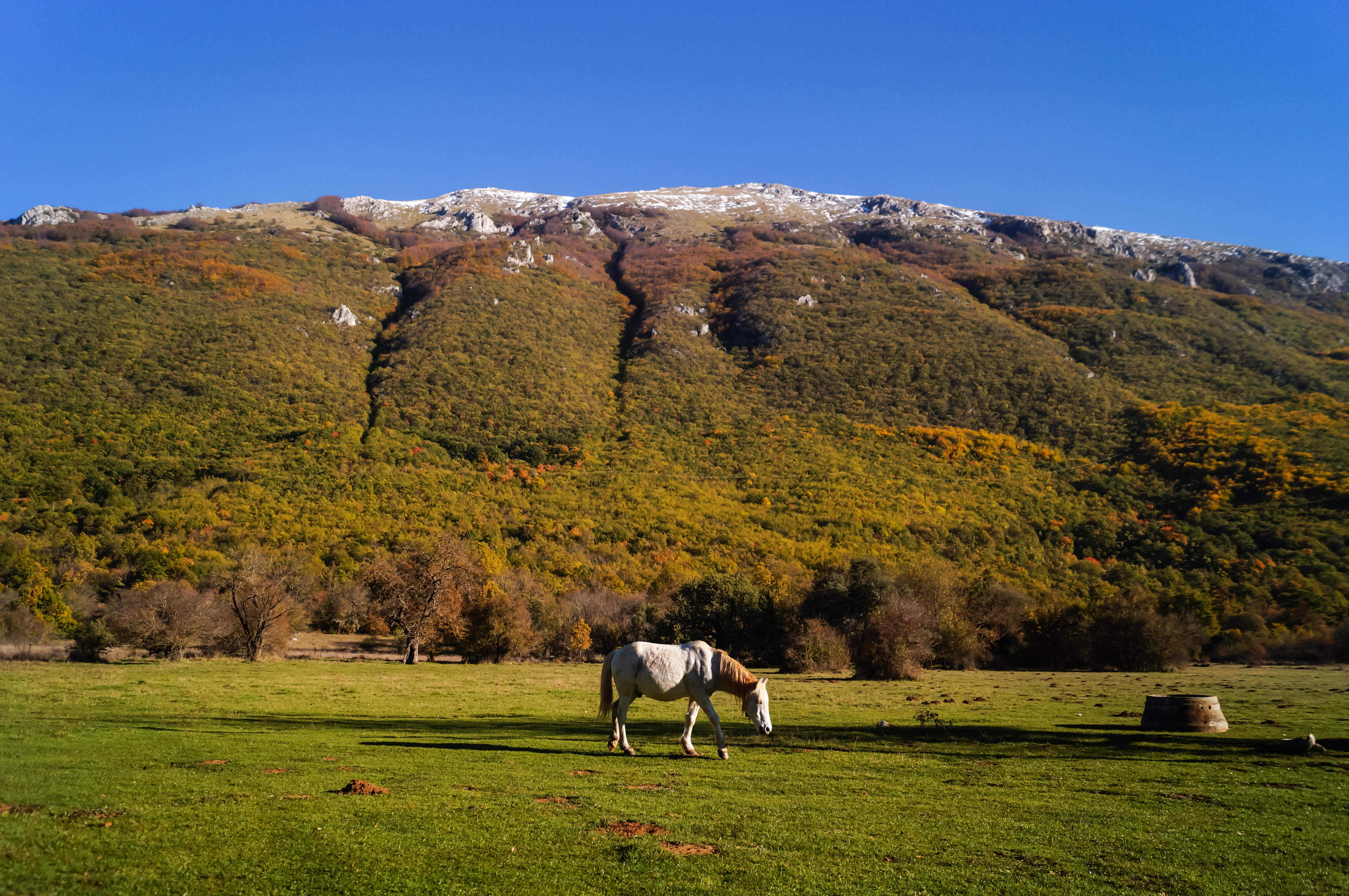 Трпејчко Поле, дел од националниот парк Галичица.